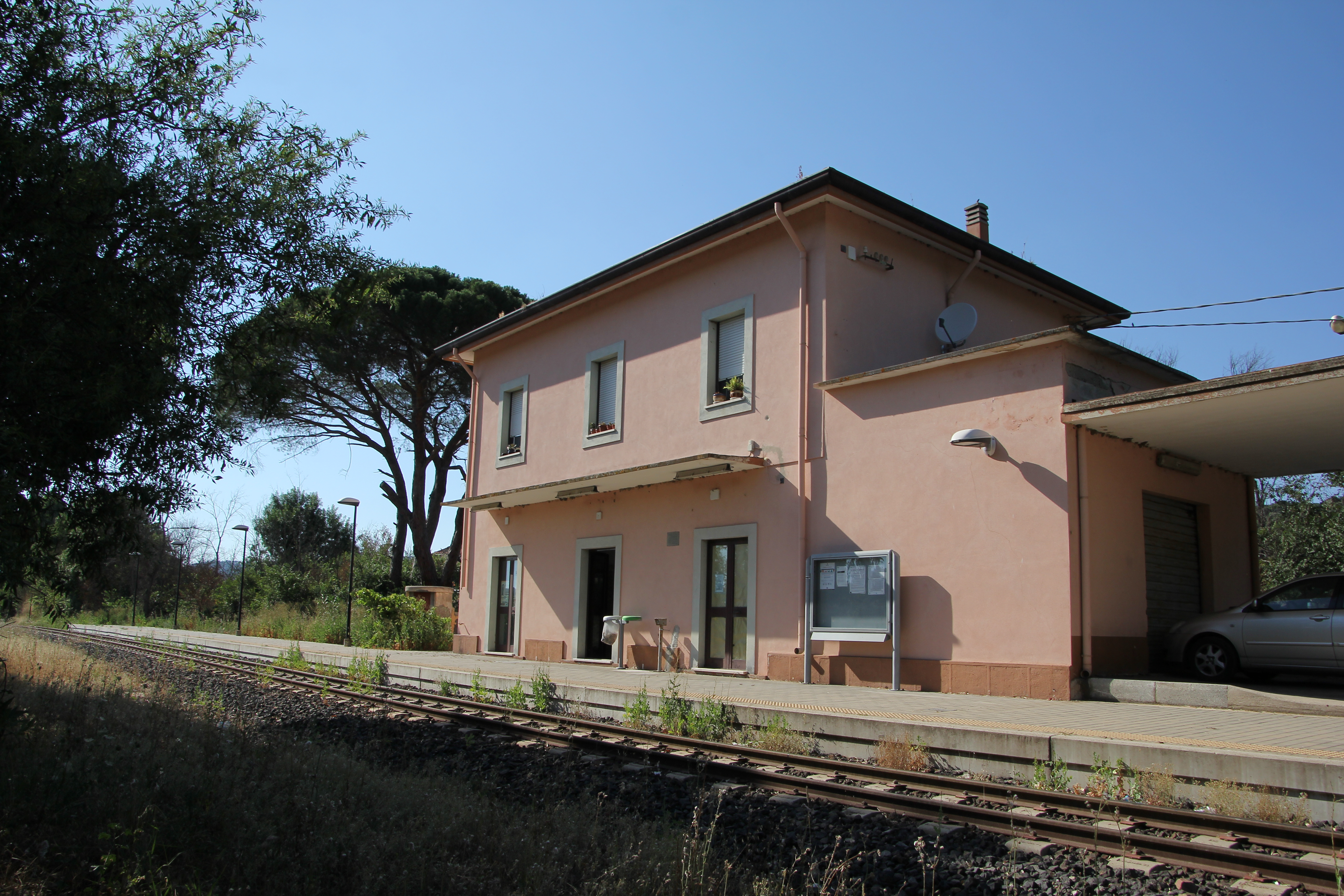 Orotelli, stazione ferroviaria